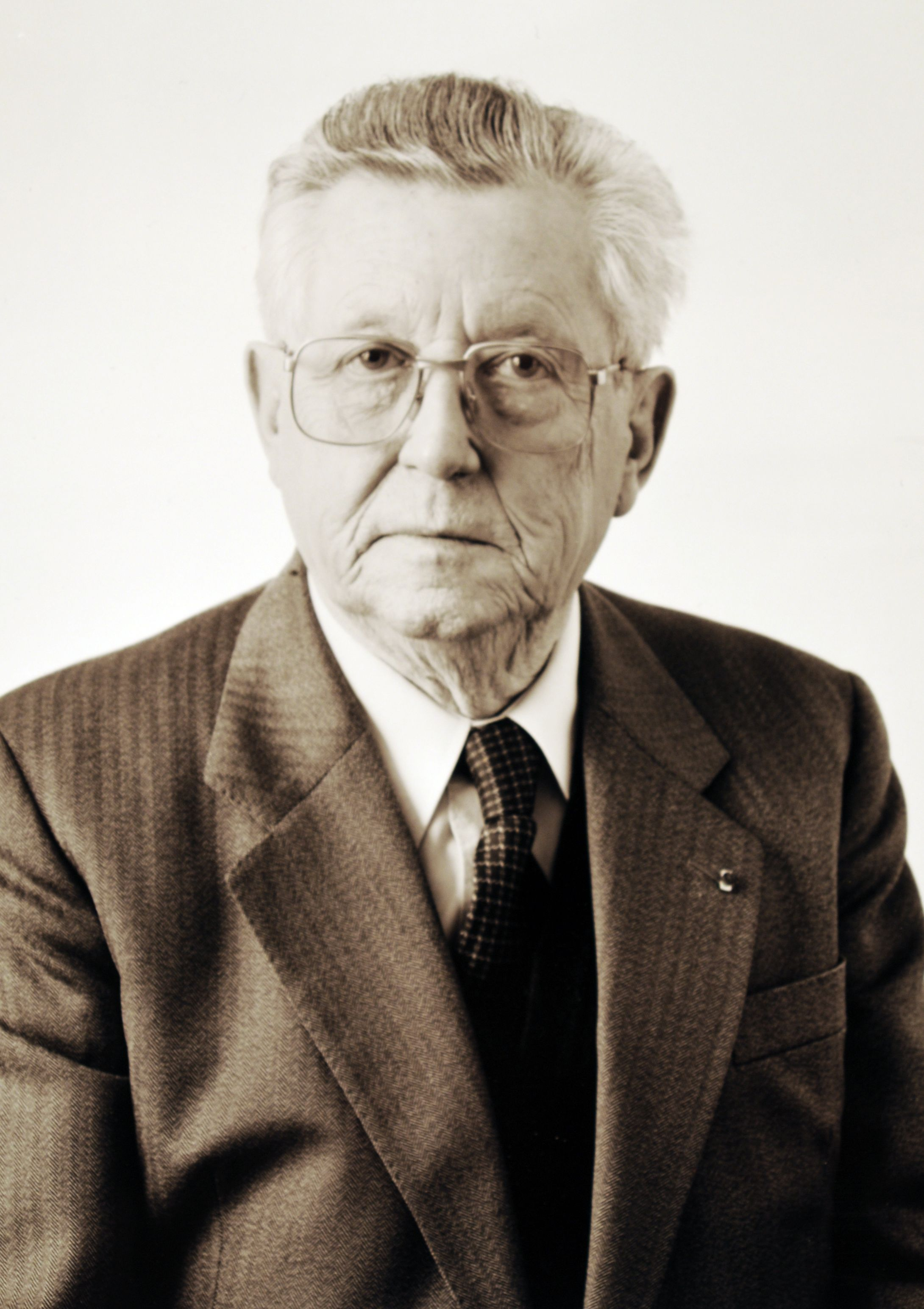 portrait